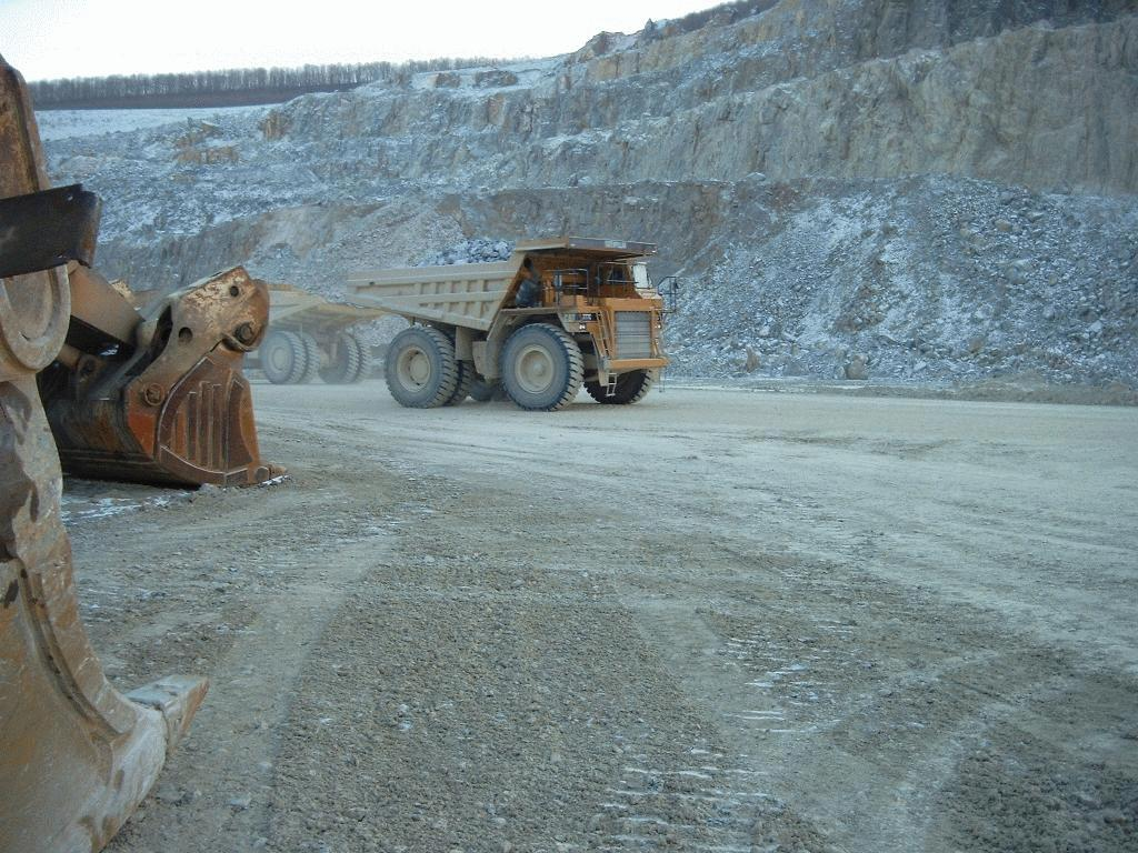 SKW (Schwer-Kraft-Wagen) und Radlader beim Abbau von Kalkstein in einem Wülfrather Kalksteinbruch